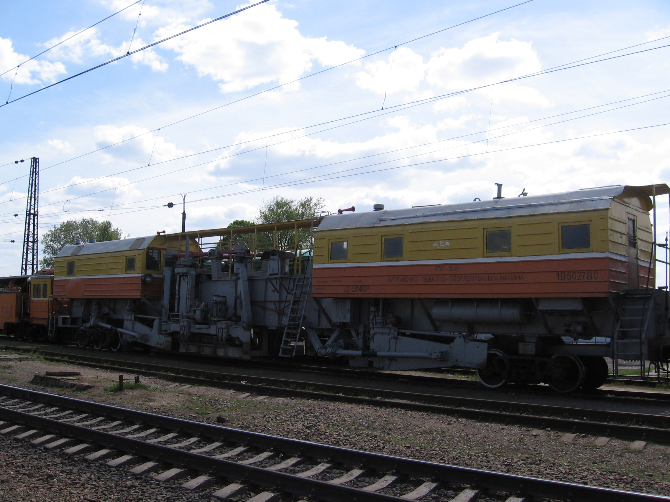 Виправочно-підбивочно-опоряджувальна машина ВПО-3000